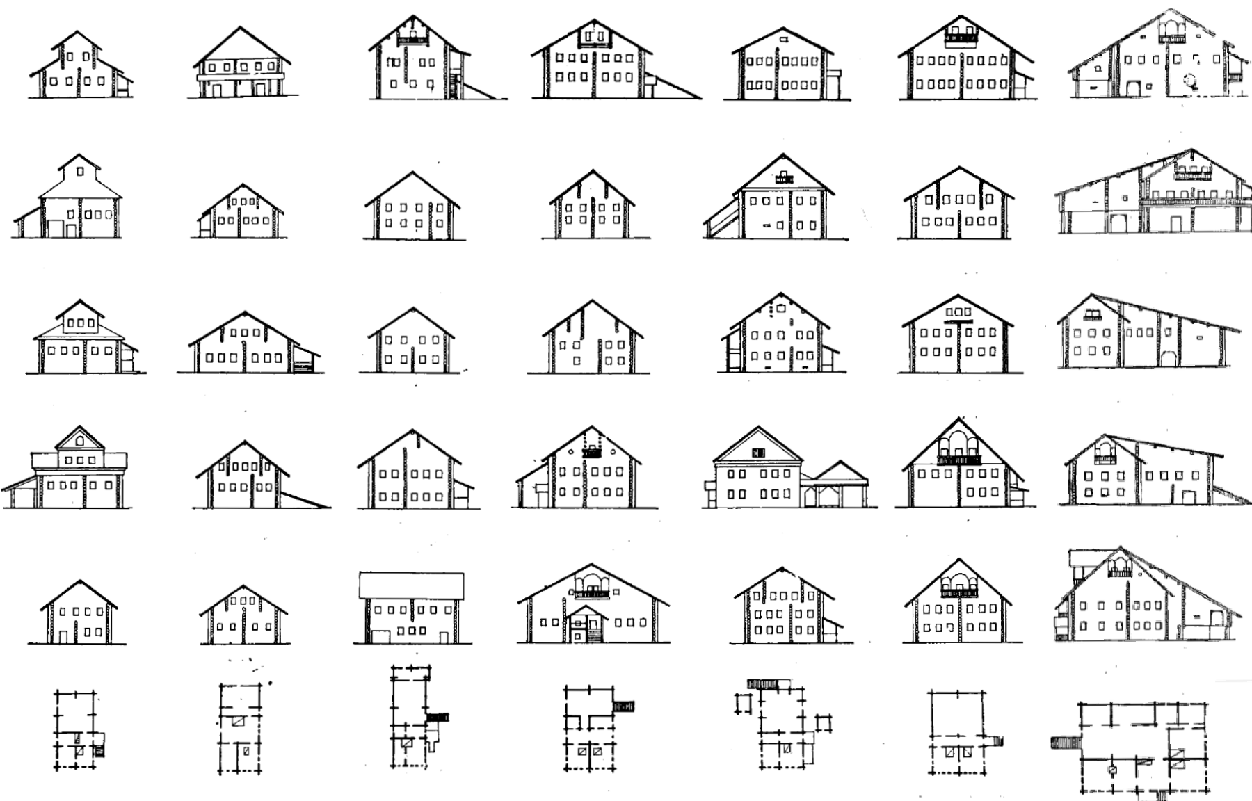 Облик русских пятистенных изб, сложившийся к XIX веку